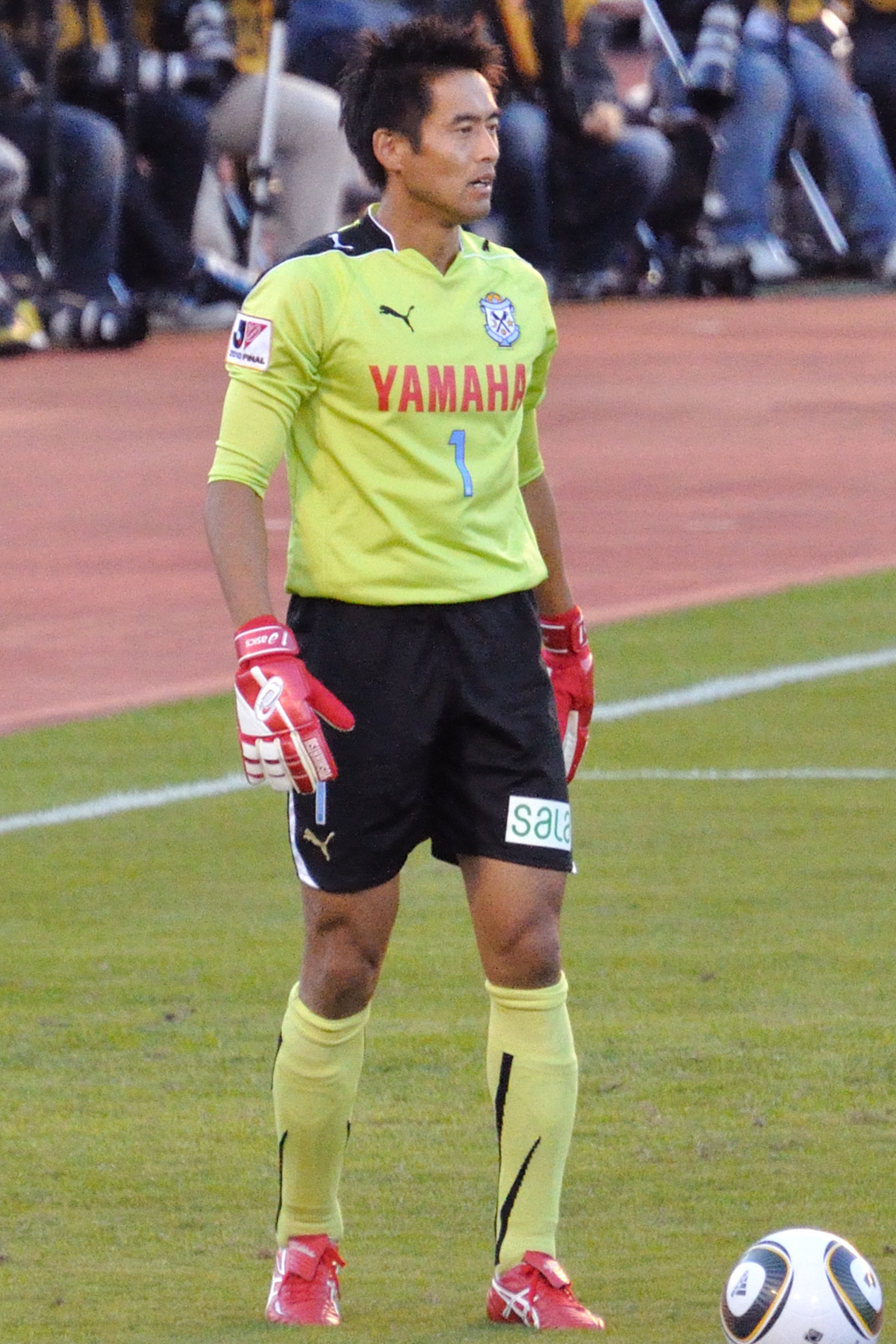 Yoshikatsu Kawaguchi DSC_7734